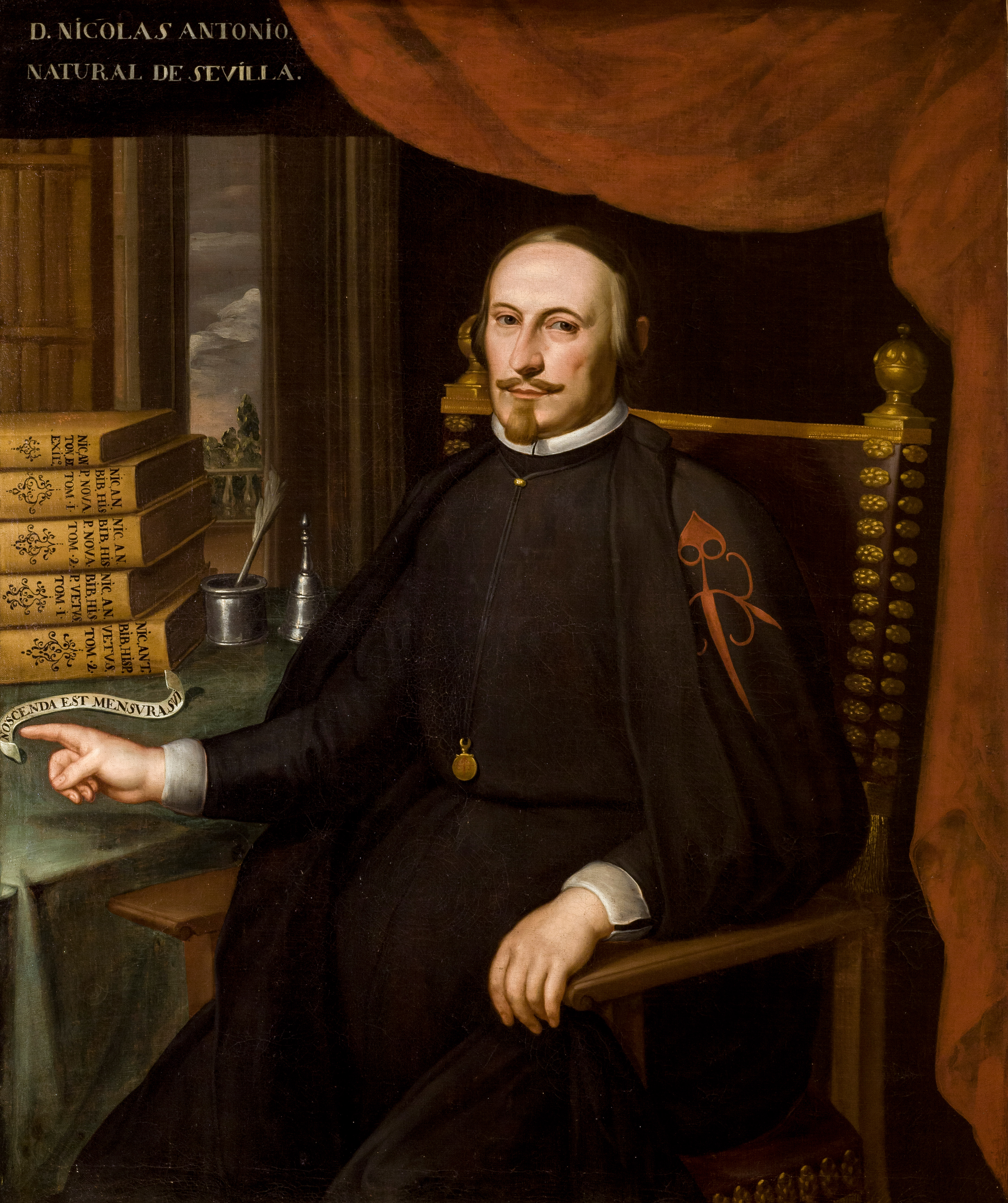 Retrato póstumo del eclesiástico, erudito y bibliógrafo sevillano Nicolás Antonio (1617-1684), que estudió Artes Liberales en el colegio de Santo Tomás en 1635 y pasó posteriormente por Salamanca y Roma. De regreso en Sevilla, comenzó a redactar su obra más famosa, Bibliotheca hispana vetus, en 1672, y Bibliotheca hispana nova en 1696,, que eran un índice de los escritores españoles desde el emperador Augusto hasta el siglo XVII. En esta obra, que procede de la Biblioteca de San Acacio, el erudito aparece vestido con un traje negro y luciendo la cruz roja de la Orden de Santiago, en la que obtuvo un hábito en 1645 por concesión del rey Felipe IV.